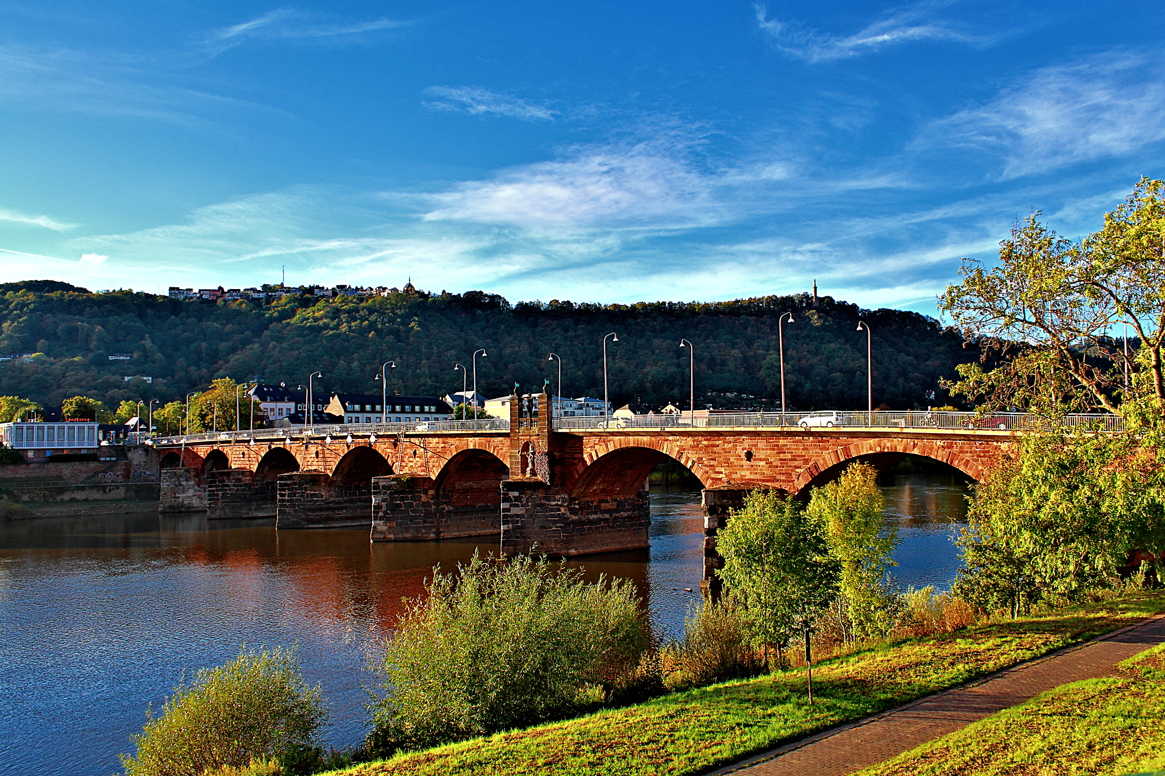 Römerbrücke in Trier an einem Oktoberabend; fotografiert von der Südseite